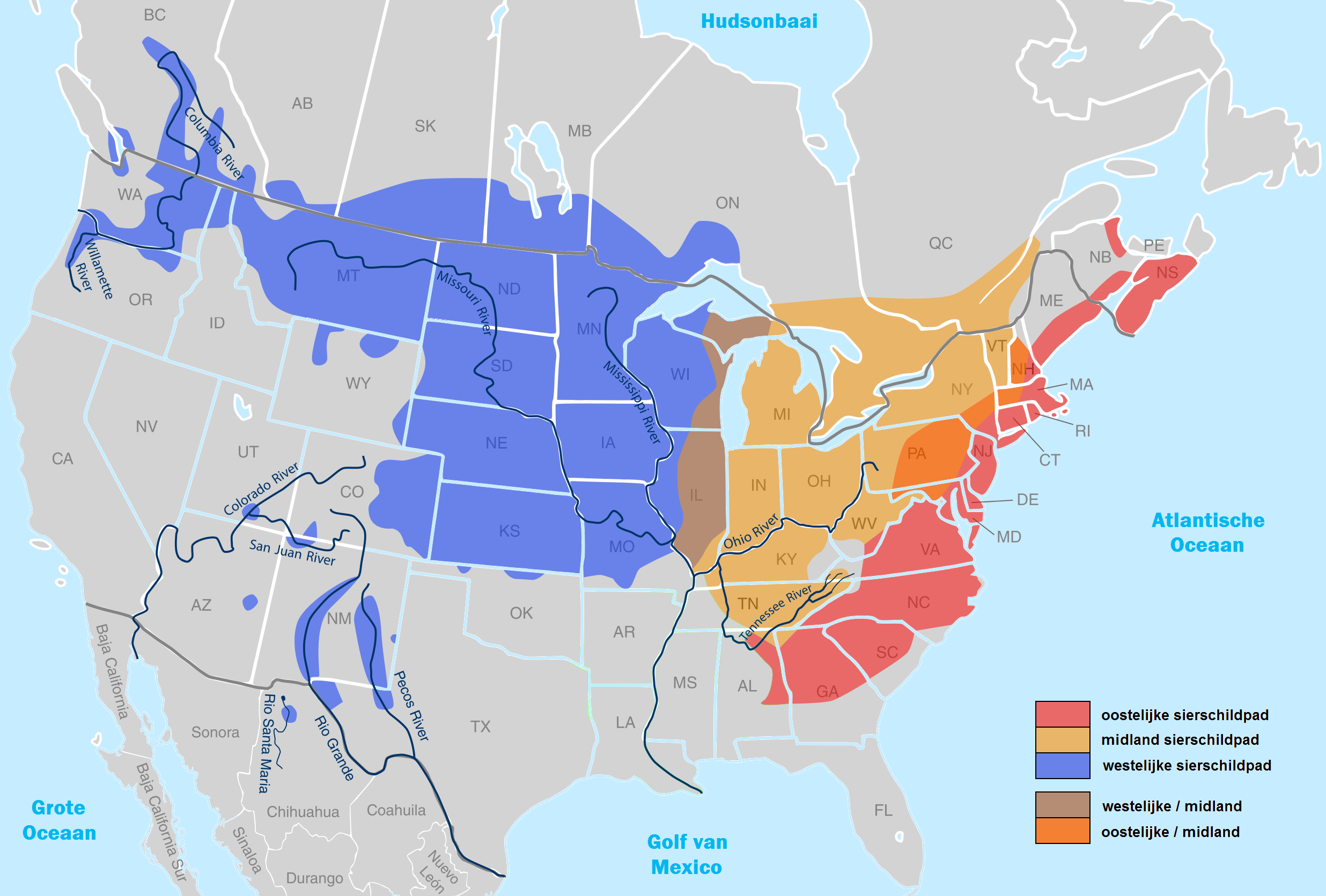 Distribution without C dorsalis